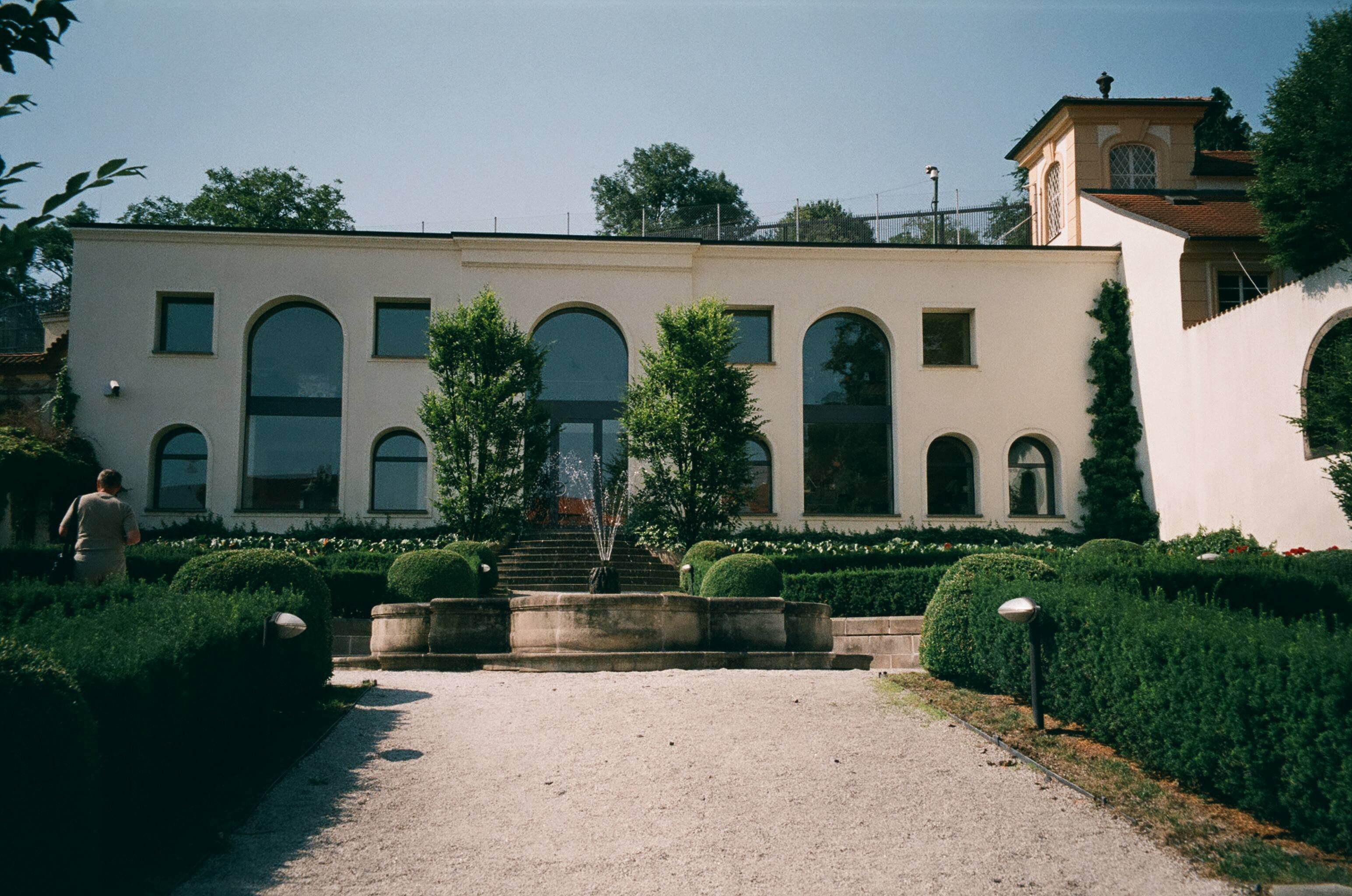 Vratislavská zahrada